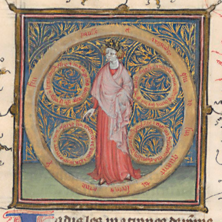 Iluminura Roue de la Fortune de Le Livre du Voir Dit nas obras completas de Guillaume de Machaut